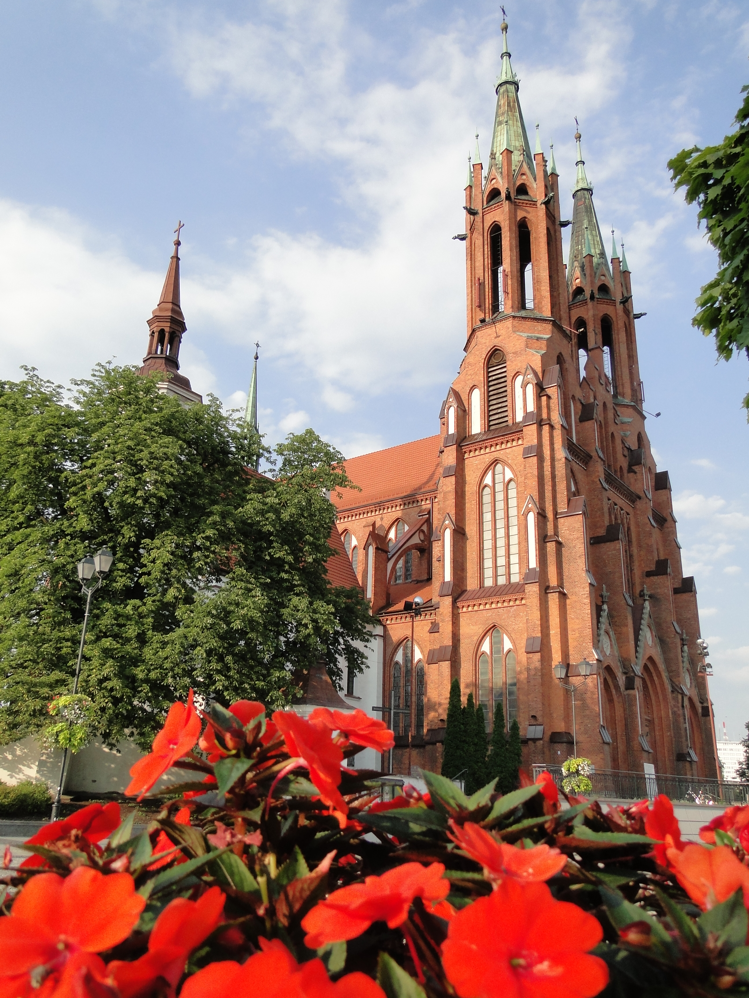 Białystok, kościół katedralny p.w. Wniebowzięcia NMP, 1900-1906